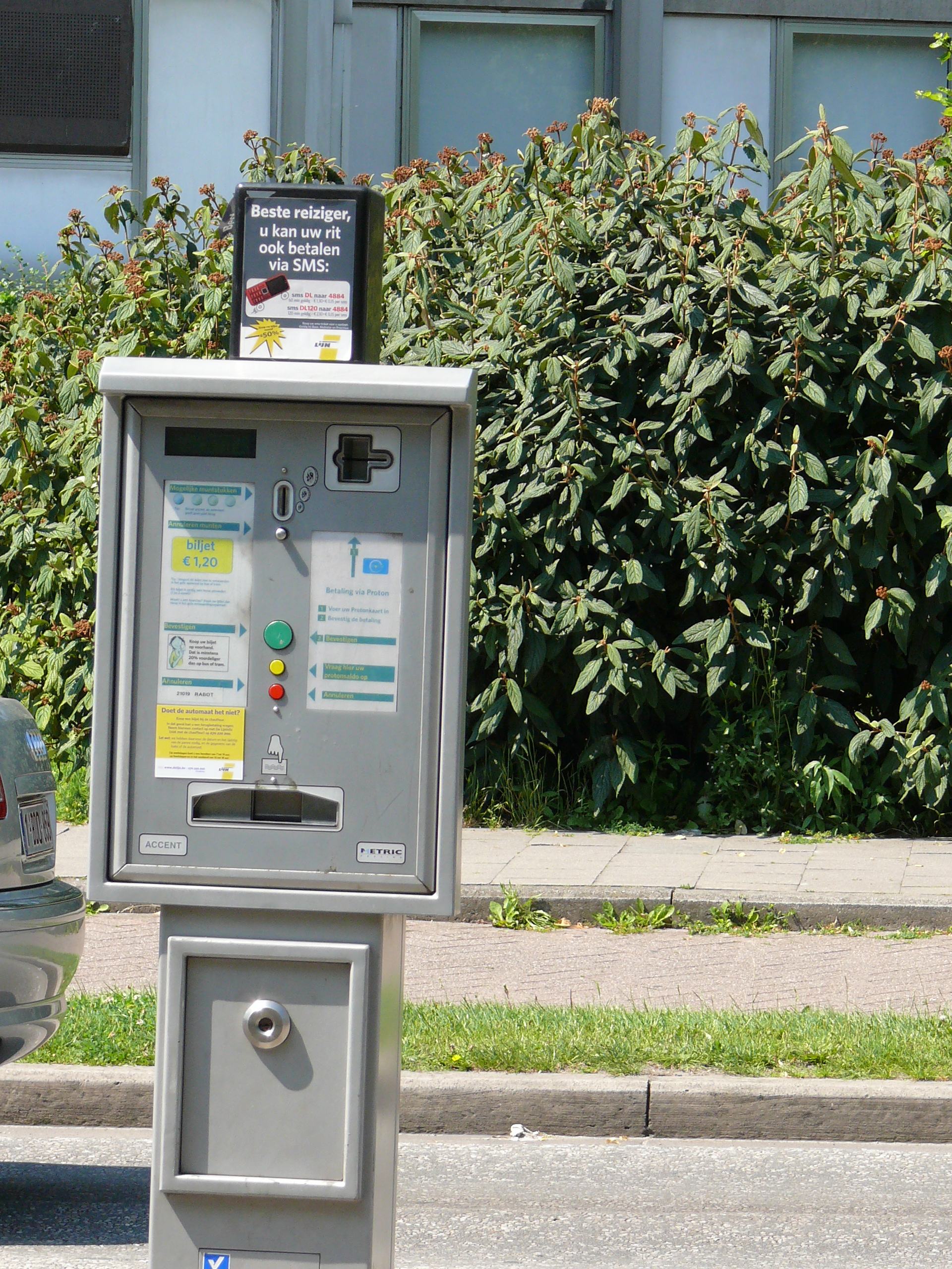 Distributeur de billets des transports en commun de Gand